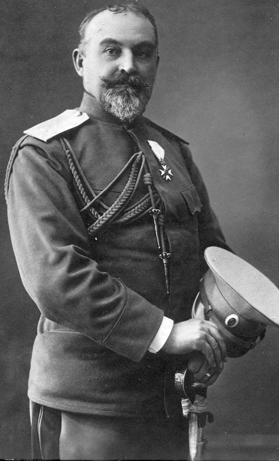 general Kliment Bojadzijev - bulgarian military officer and politician